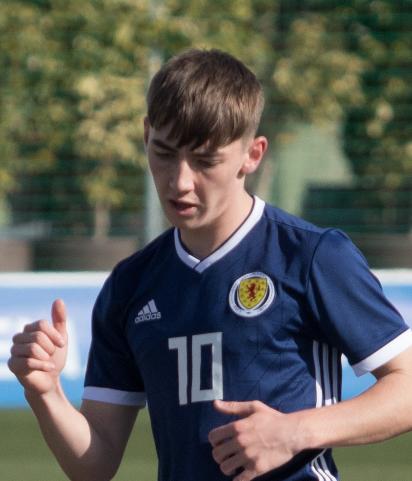 espana-escocia-sub19-16